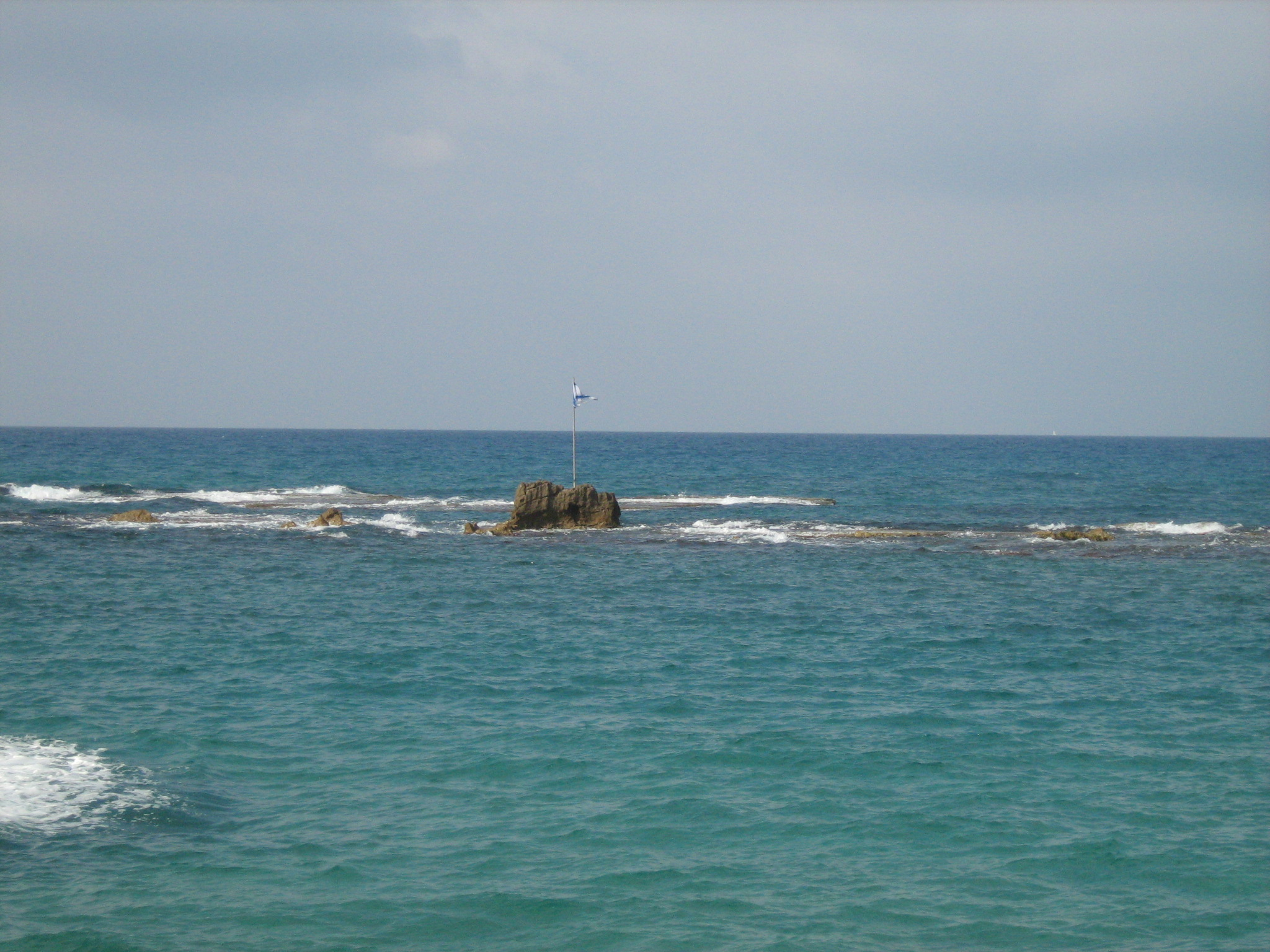 סלע אנדרומדה